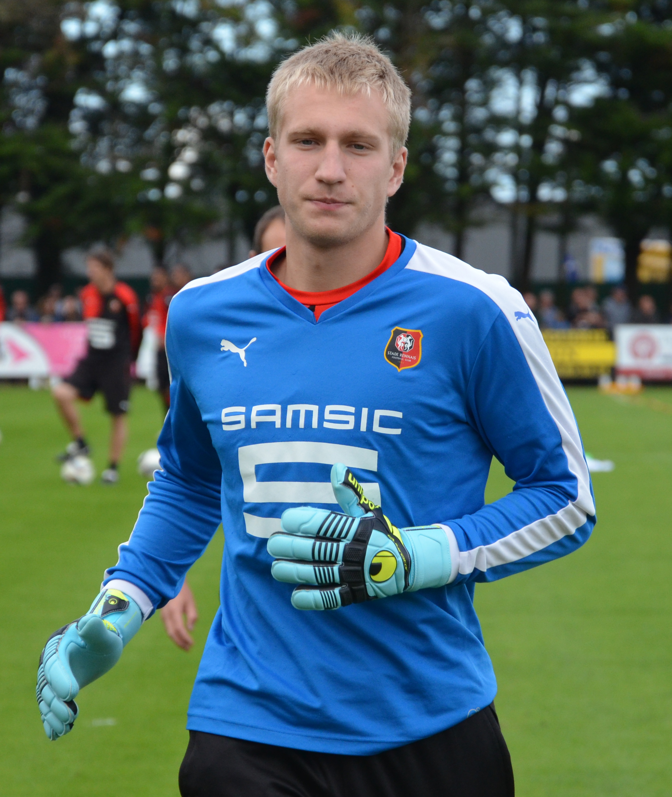 Photographie prise lors d'un entraînement du Stade rennais délocalisé à Dinan. Ici, Edvinas Gertmonas.